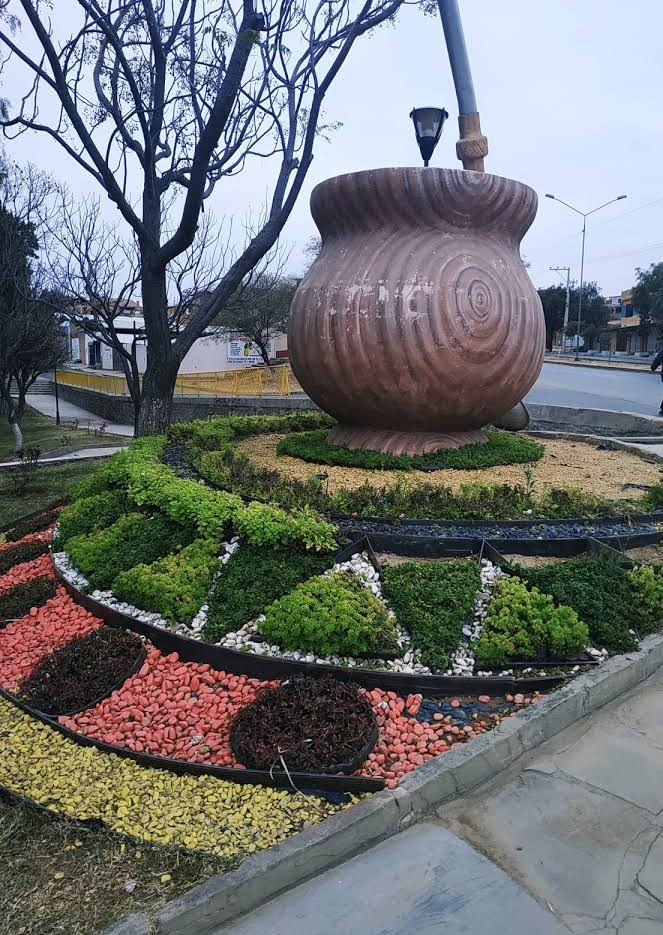 Monumento de un Mate, Poro en tarija